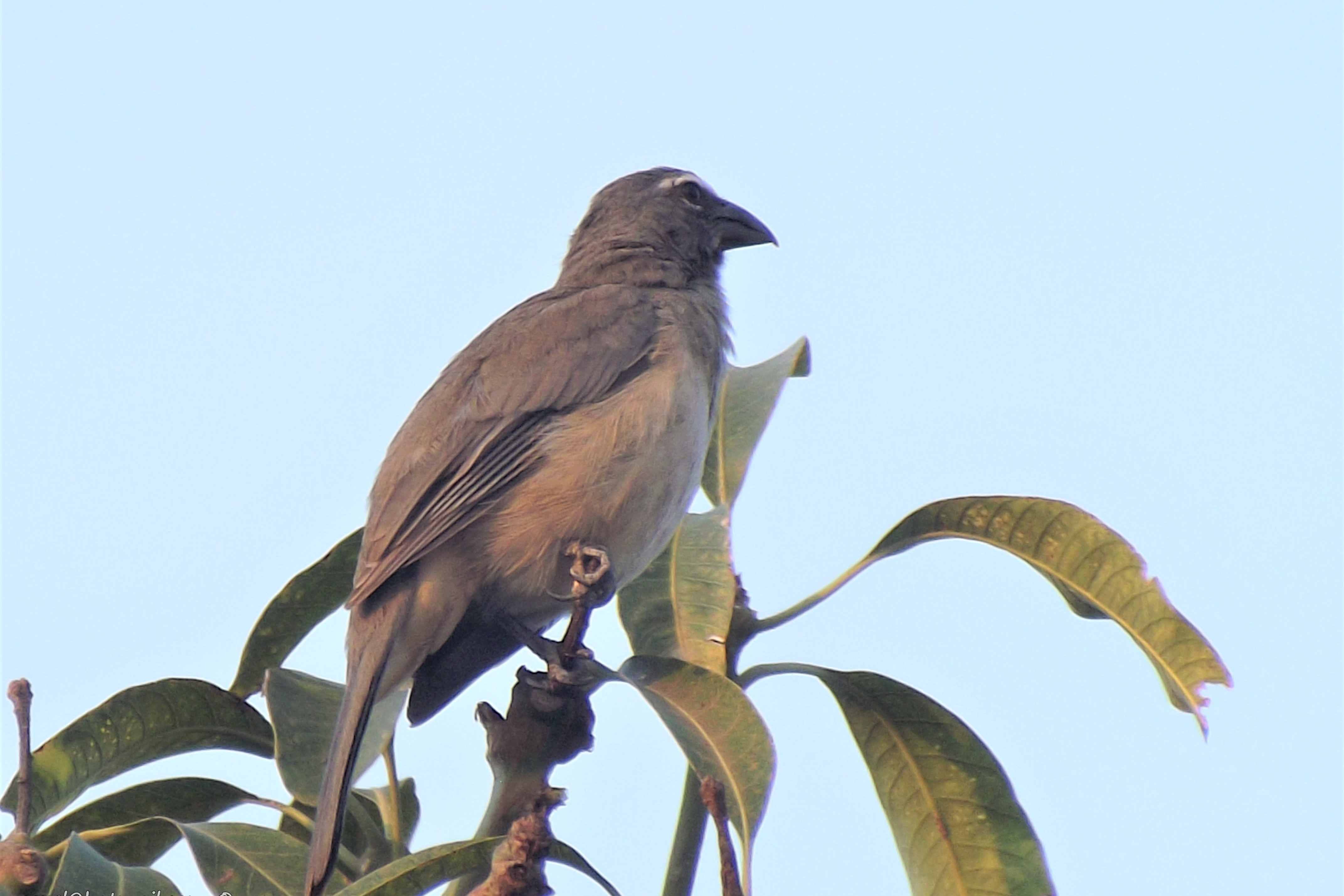 Lechosero ajisero posando en lo alto de un árbol en Maracay, Venezuela